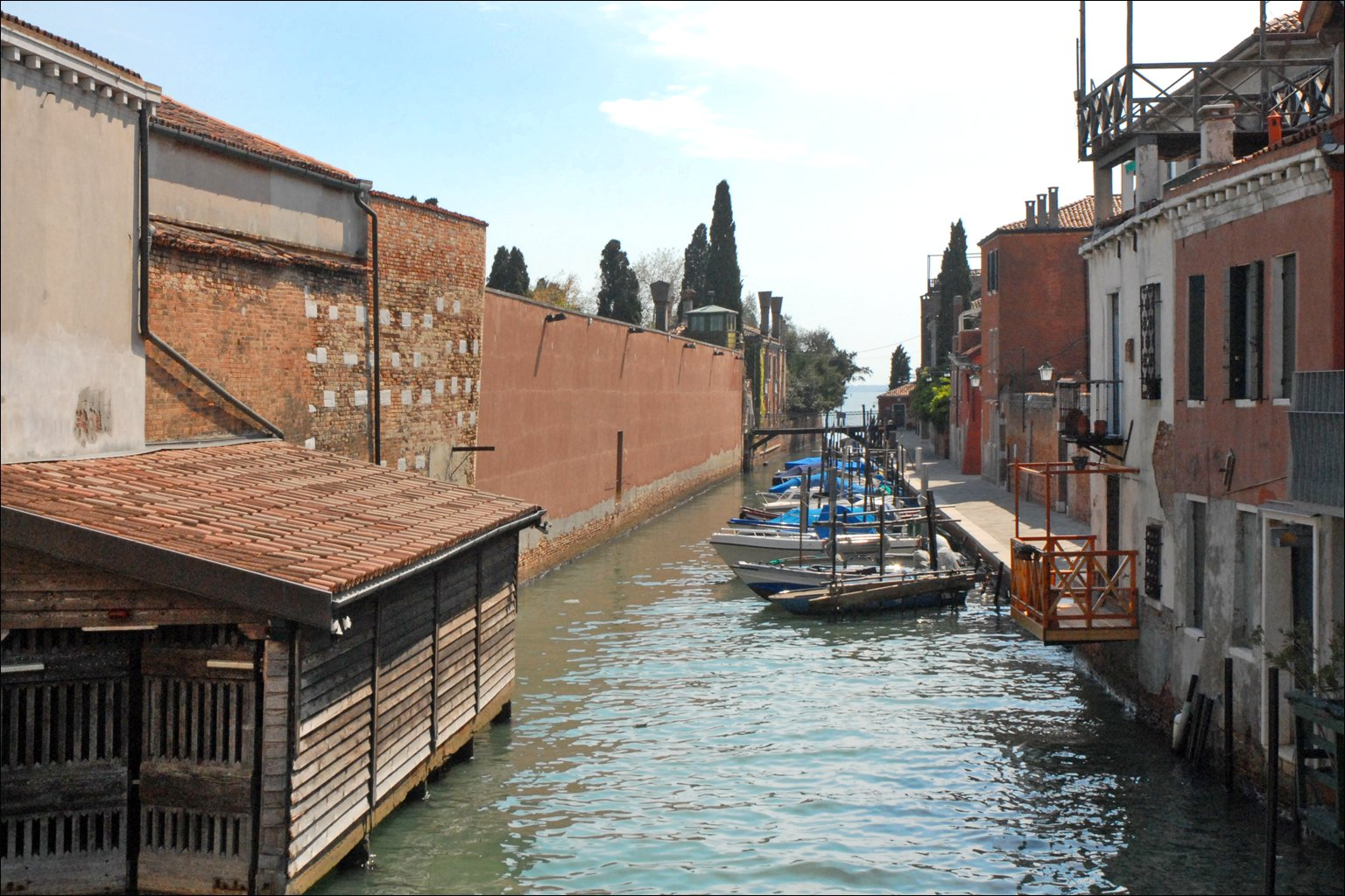 Le Rio della Croce L'église della Croce et le couvent ont été fermés en 1806 sous Napoléon et les bâtiments ont été intégrés à une prison pour hommes qui est aujourd'hui non occupée et dont on voit le mur d'enceinte à gauche du rio. La propriété "Giardino Eden", située au fond, est mitoyenne de cette prison pour hommes. A droite du Rio se trouvent des habitations.